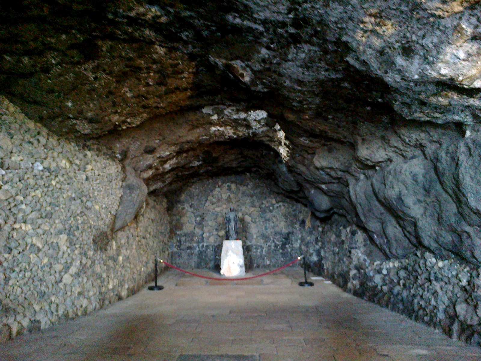 Canaries Tenerife Candelaria Punta San Blas Ermita Cueva